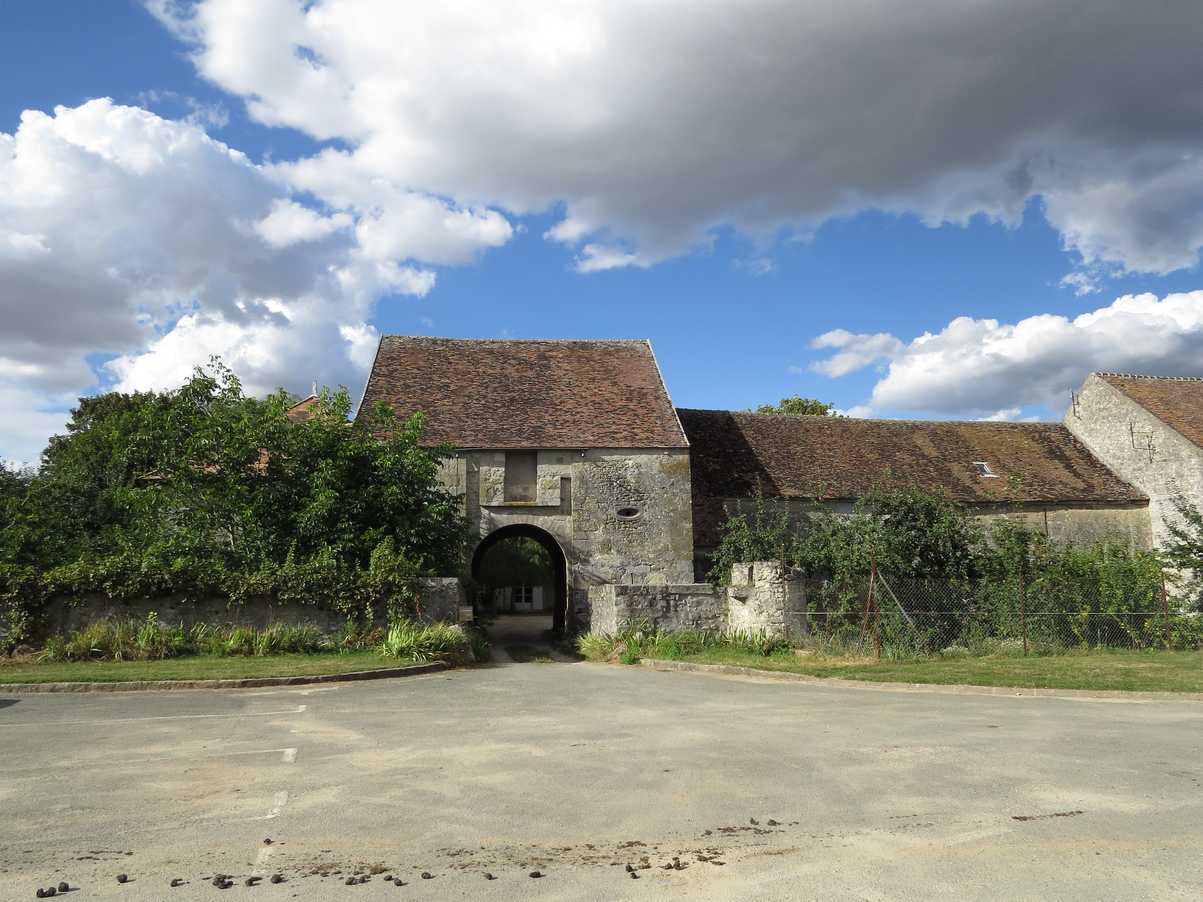 Photos prises à Châtenoy (Seine-et-Marne)